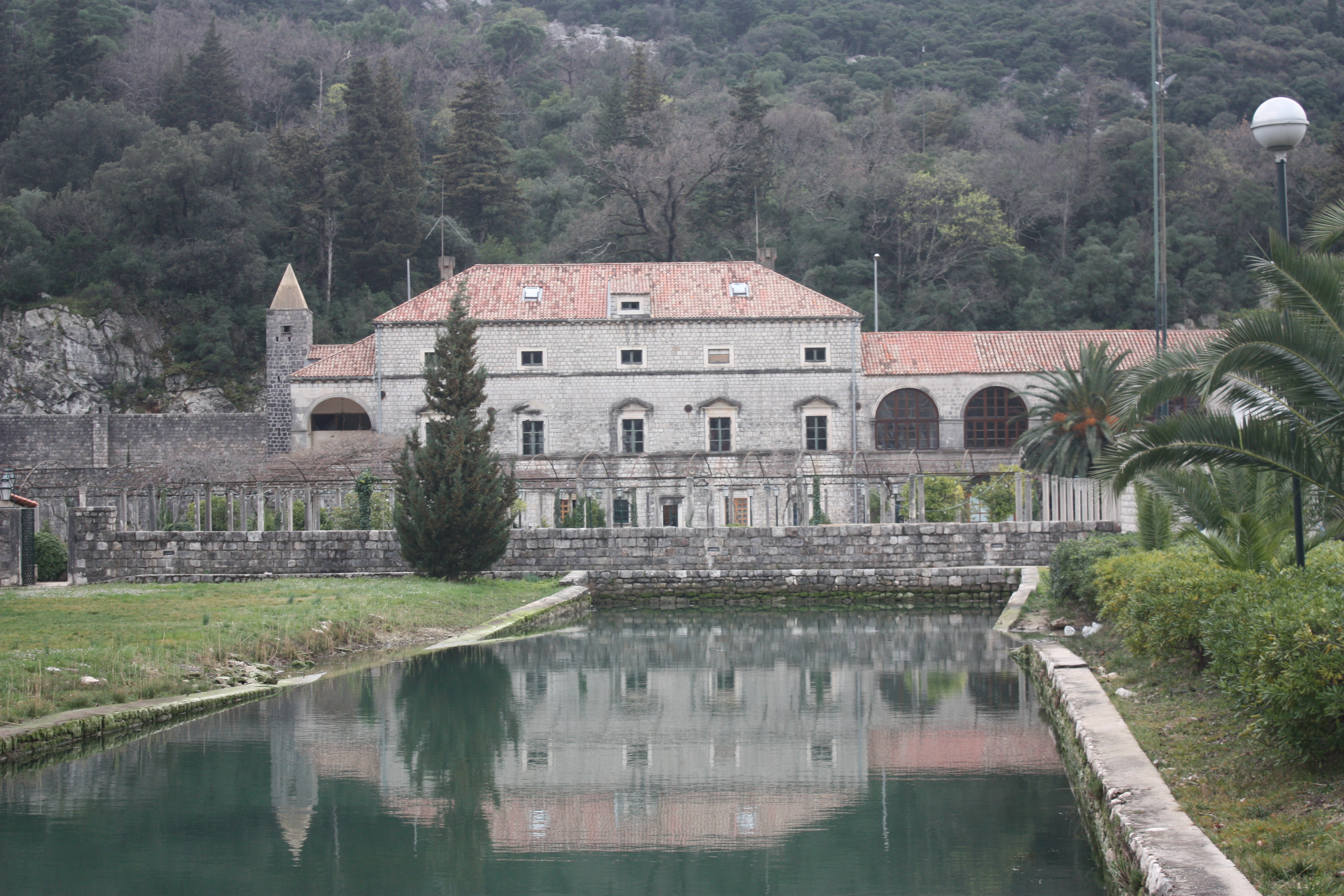 Dvorac Sorkočević u Marini Komolac